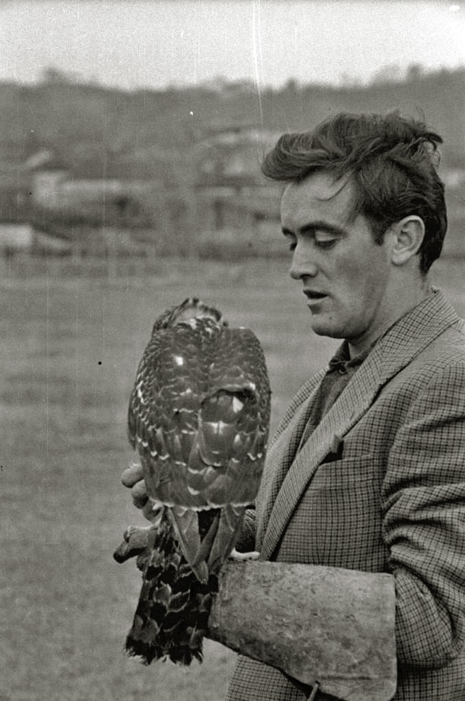 Título original: Félix Rodríguez de la Fuente realizando una exhibición con una rapaz en el hipódromo de Lasarte (2/4) Localización: San Sebastián (Guipúzcoa)